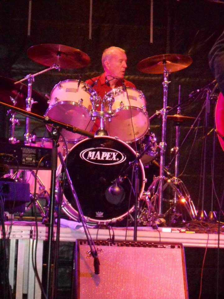 John Steel lors d'un concert des Animals & Friends à Hastière-Lavaux, Belgique.